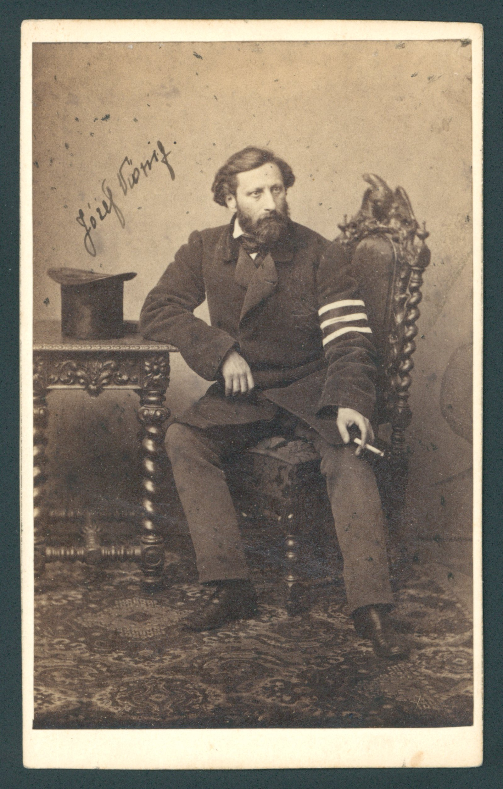 Józef Kenig, 1861 r.